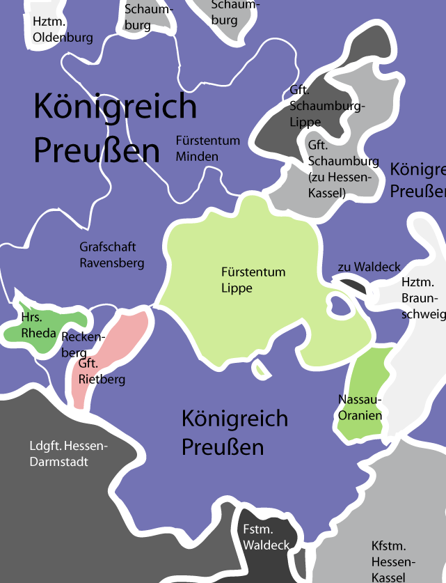 Todays Ostwestfalen-Lippe and neighboring territories as of July 1806